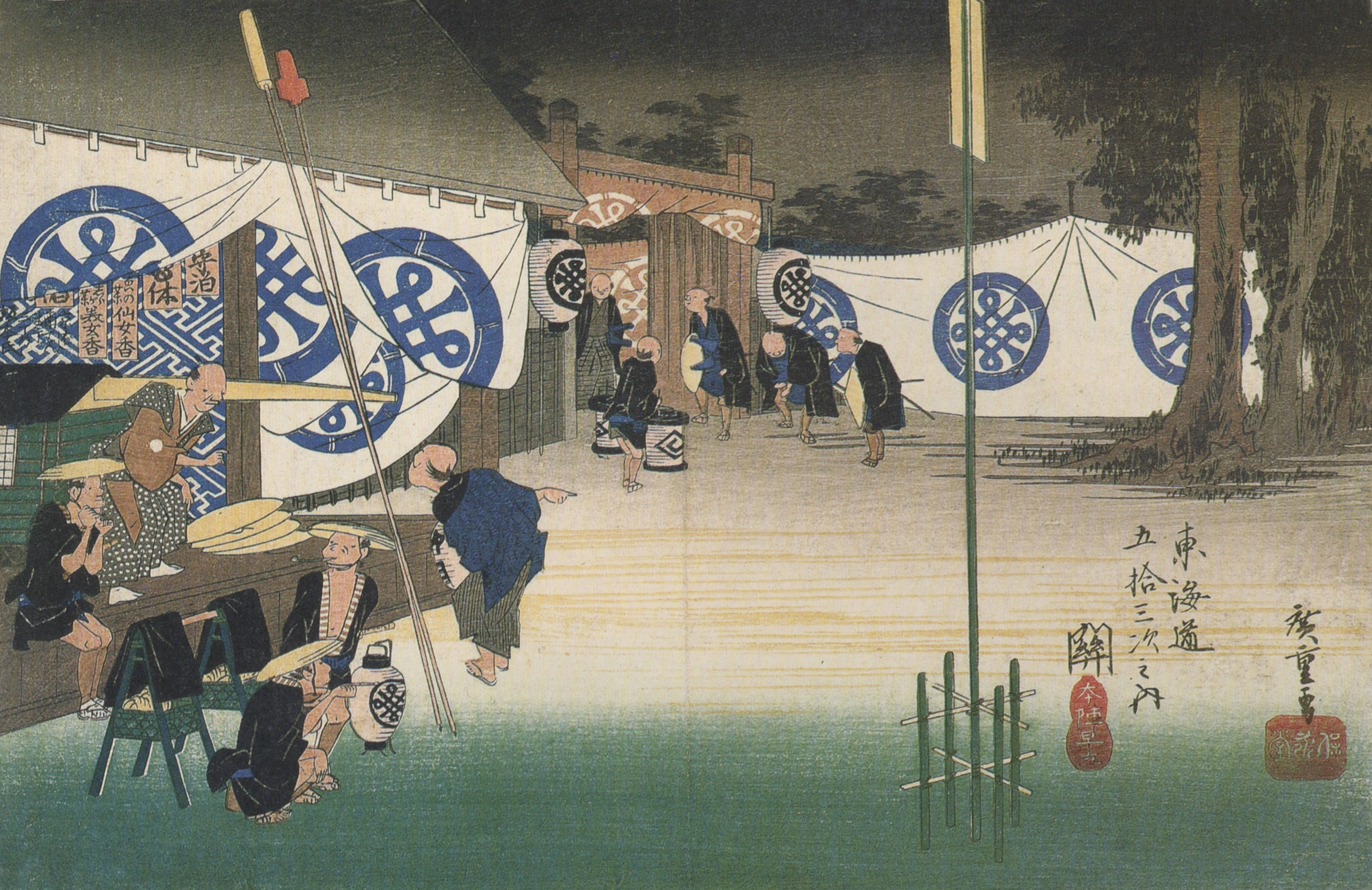 "Tokaido-53tugi Seki",ukiyo-e by Hiroshige.